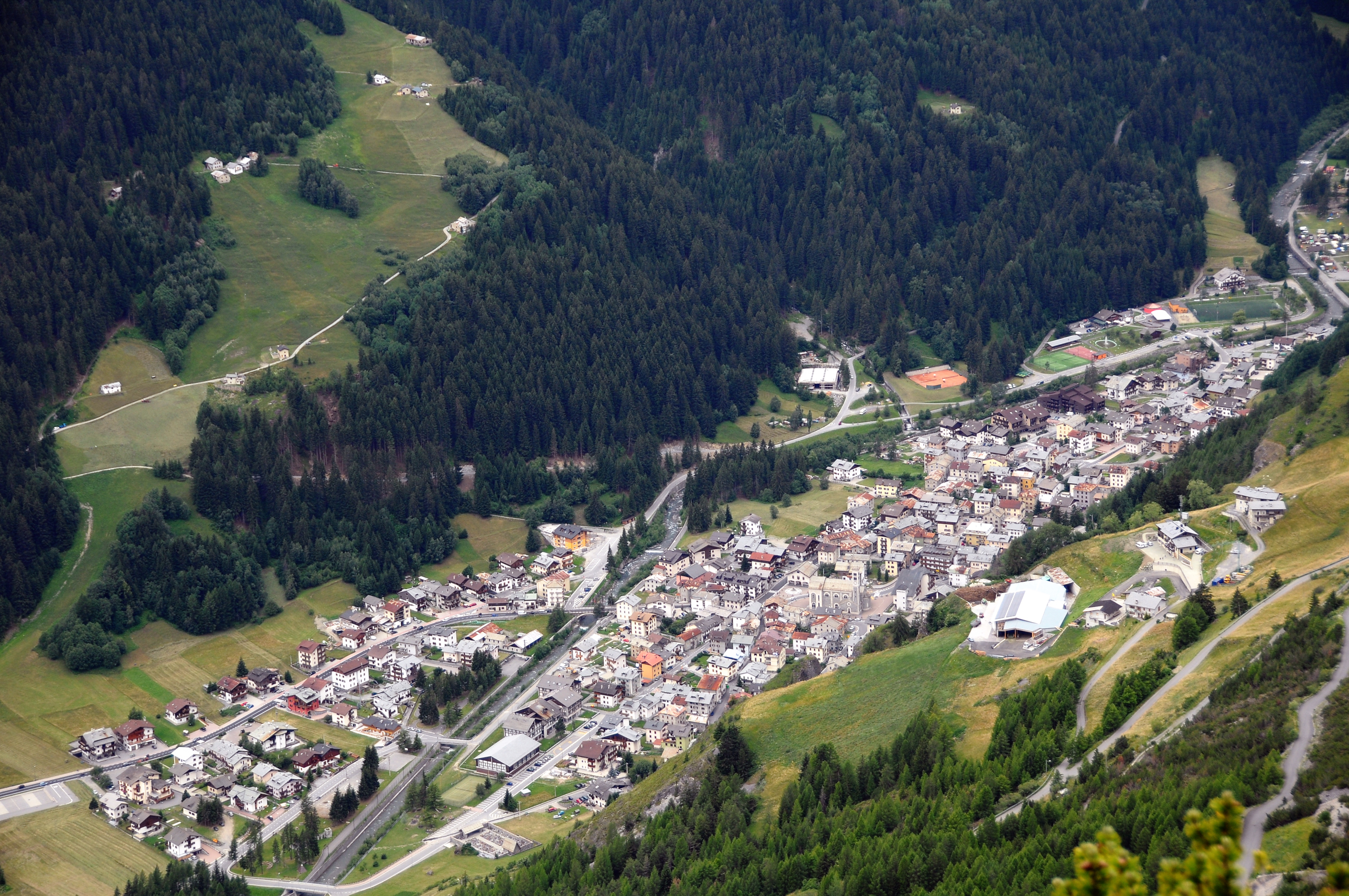 Il paese di Isolaccia ripreso dal "Picco della Croce"